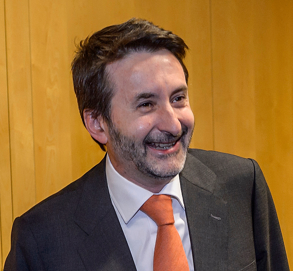 Josu Jon Imaz